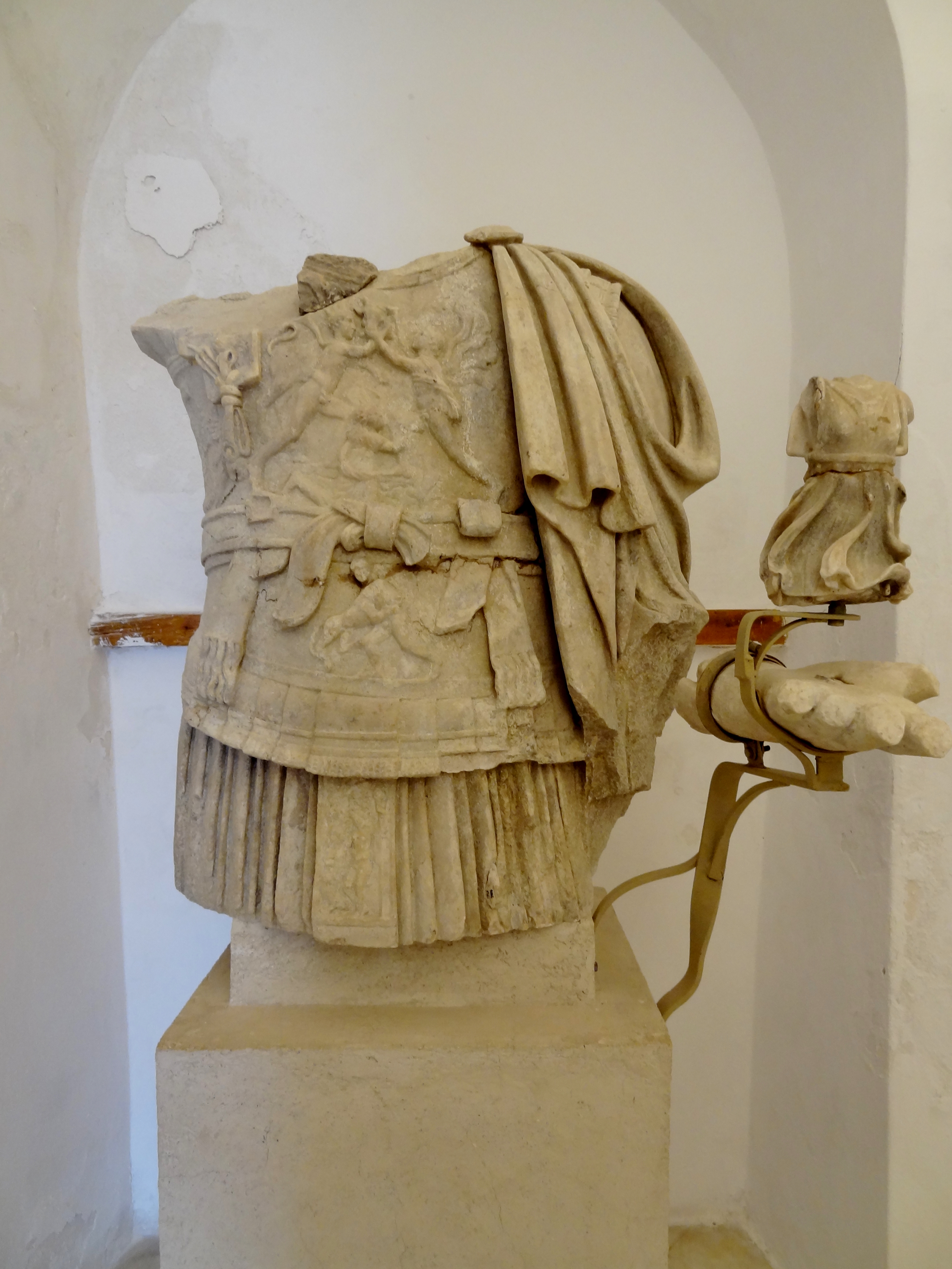 Torso der Statue des Marcus Antonius aus der Cella des Heiligtums von Yria auf Naxos, Archäologisches Museum Naxos, Kykladen, Griechenland